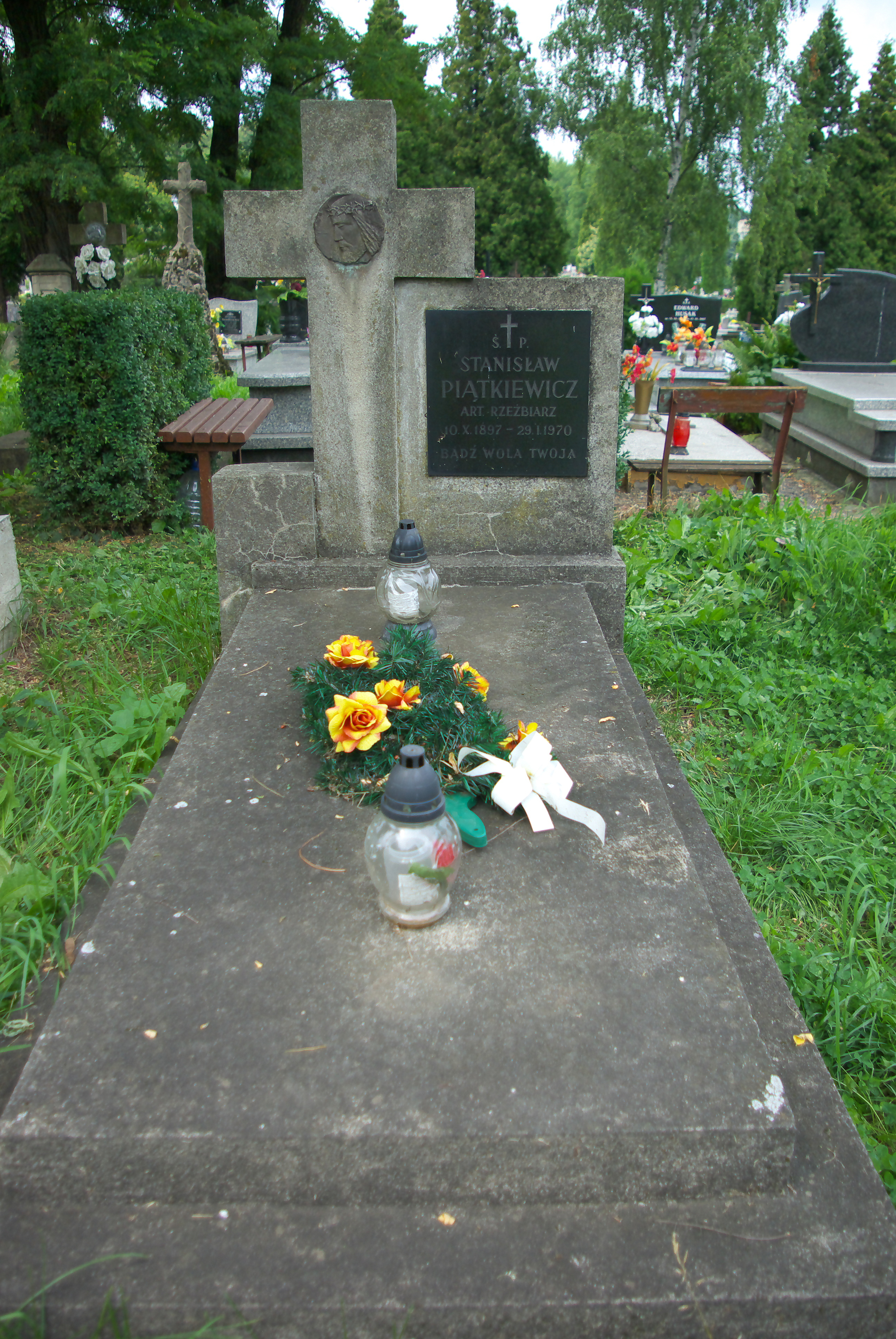 Grób Stanisława Jana Piątkiewicza w części "Matejki Stary" Cmentarza Centralnego w Sanoku.